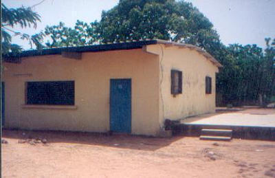 BatimentscolaireBoundiali